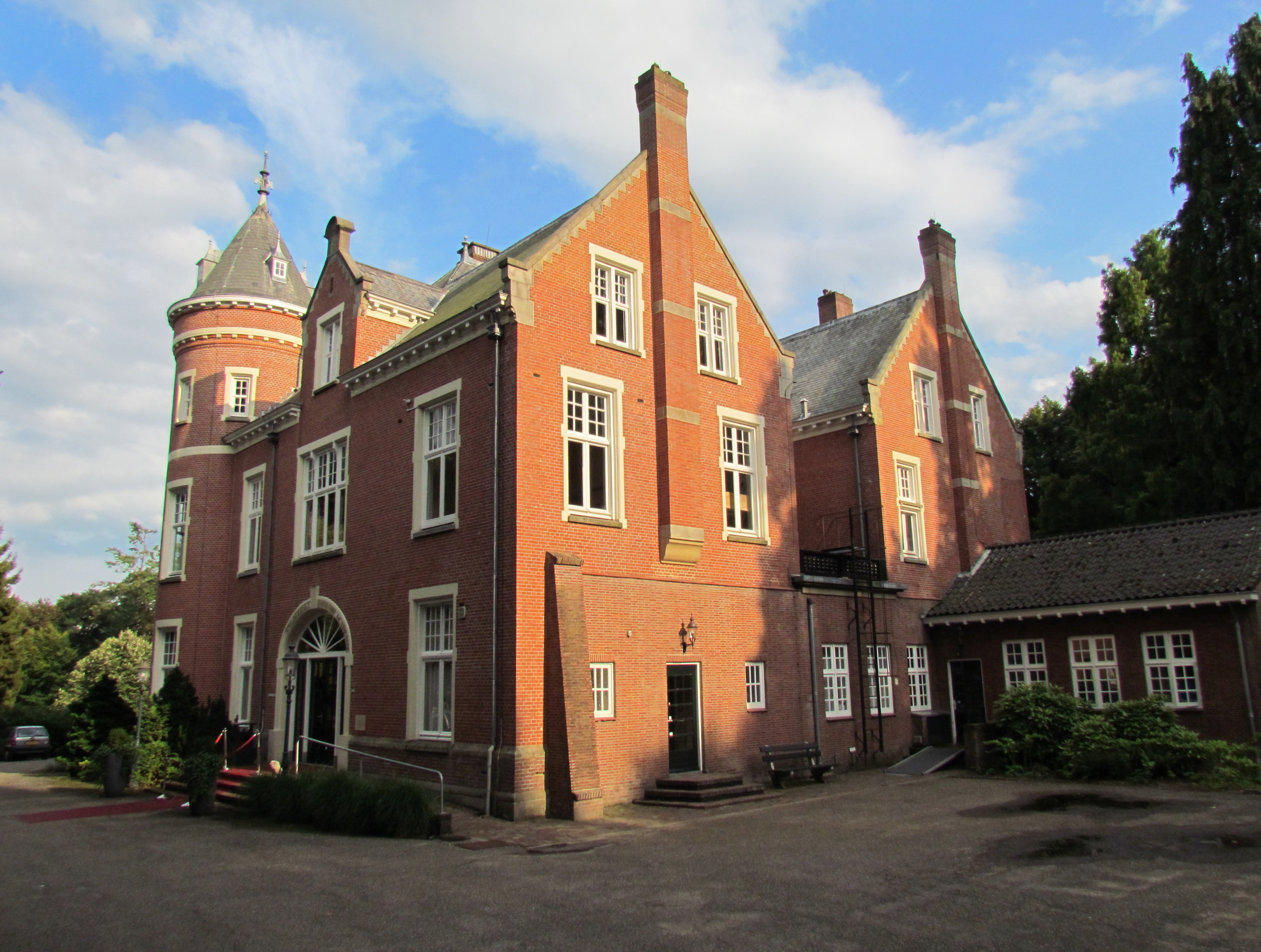 Villa Spelderholt op Parc Spelderholt bij Beekbergen (NL), gebouwd in 1908 voor F.L. Teixeira de Mattos, ingenieur van de Heidemaatschappij. Architect: Haitsma Mulier